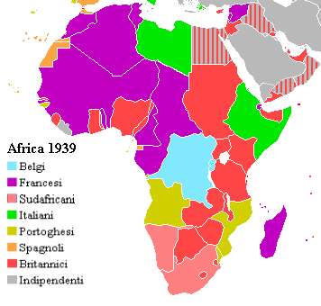 L'Africa alla vigilia della Seconda Guerra Mondiale